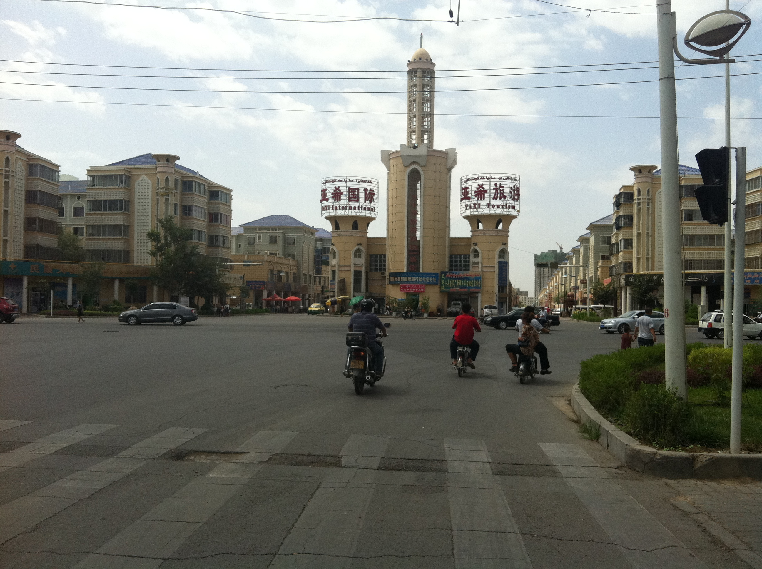 Mosque in Hami